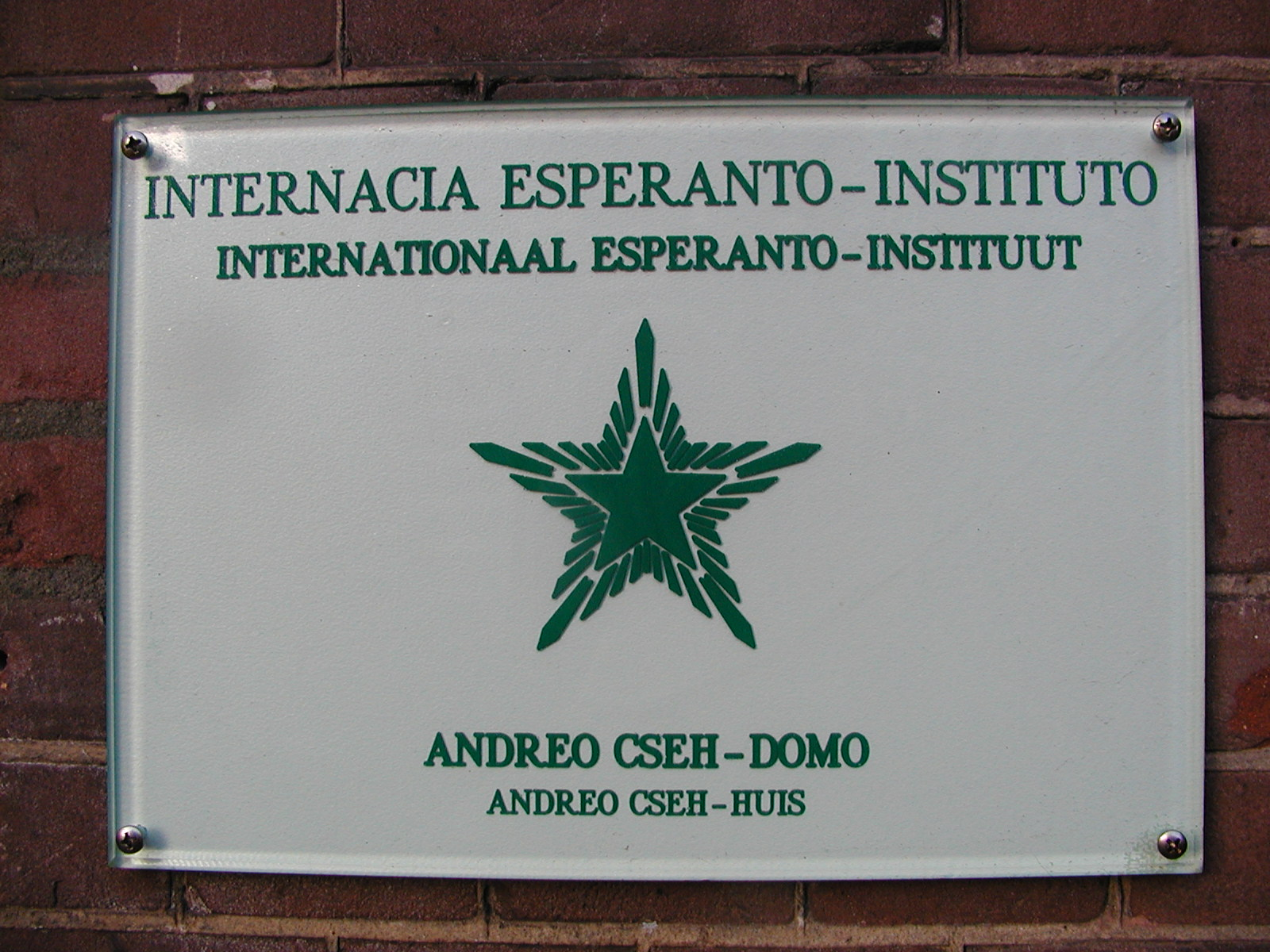 Fotis Yves Nevelsteen dum simpozio la 3-an de februaro 2007